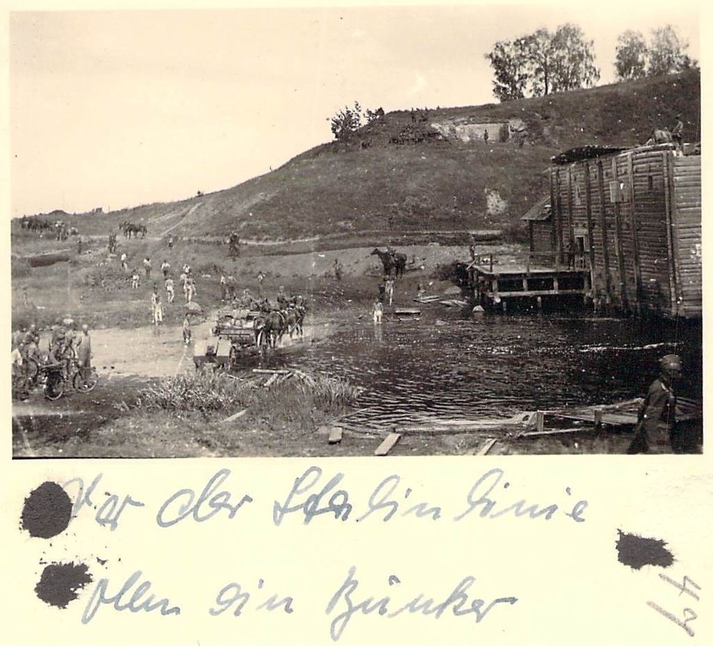 Беларуская (тарашкевіца): Гомель (Homiel), рака Туржанка (Turžanka) (?). Млын